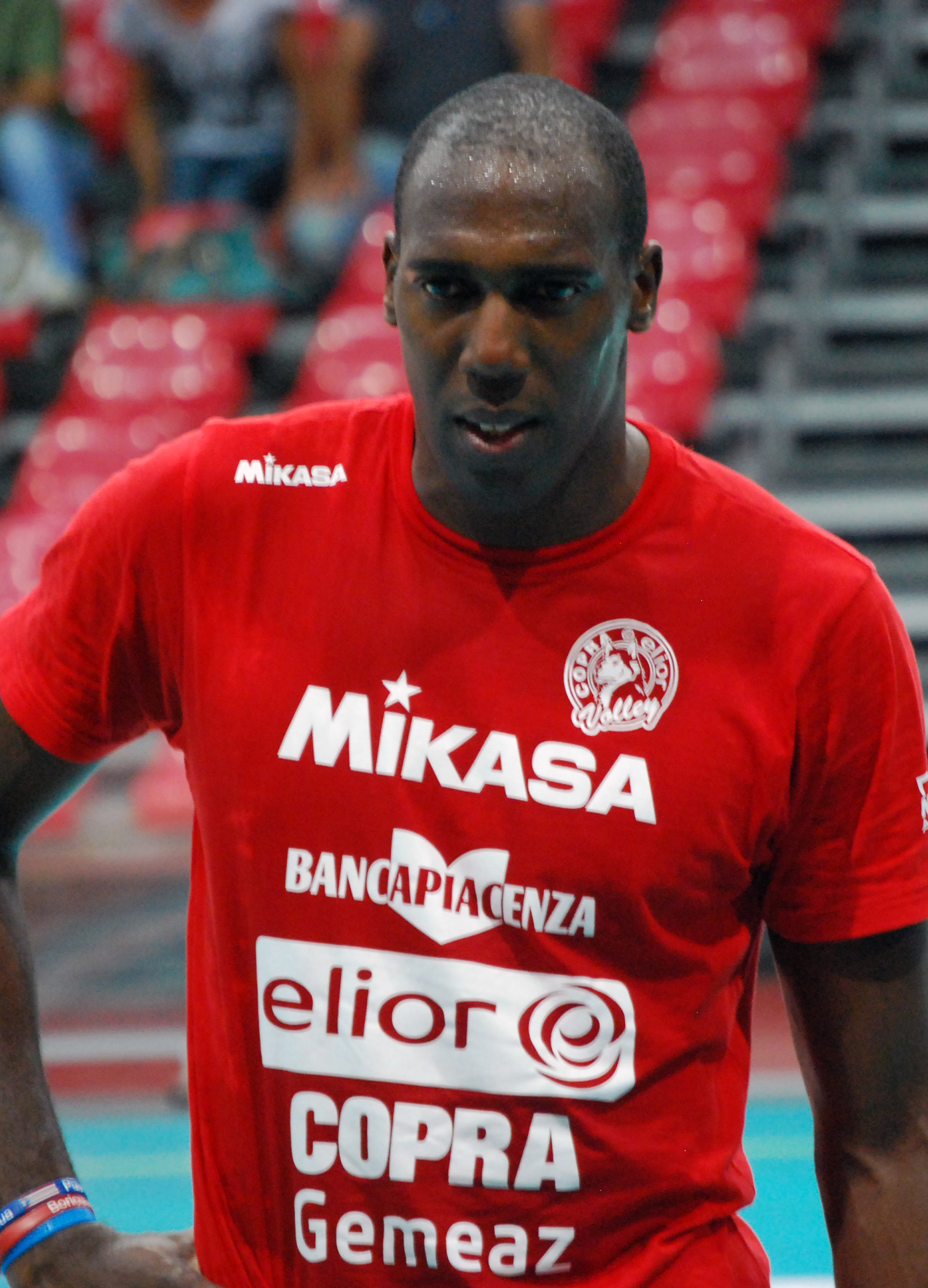 Amichevole Piacenza-Monza